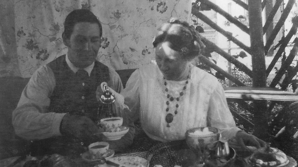 Foto Wassily Kandinskys von Franz und Maria Marc in der Laube in Sindelsdorf (Nachweis für den Fotografen: Helmut Friedel, Annegret Hoberg: Der Blaue Reiter im Lenbachhaus. Prestel, München 2013, S. 49)